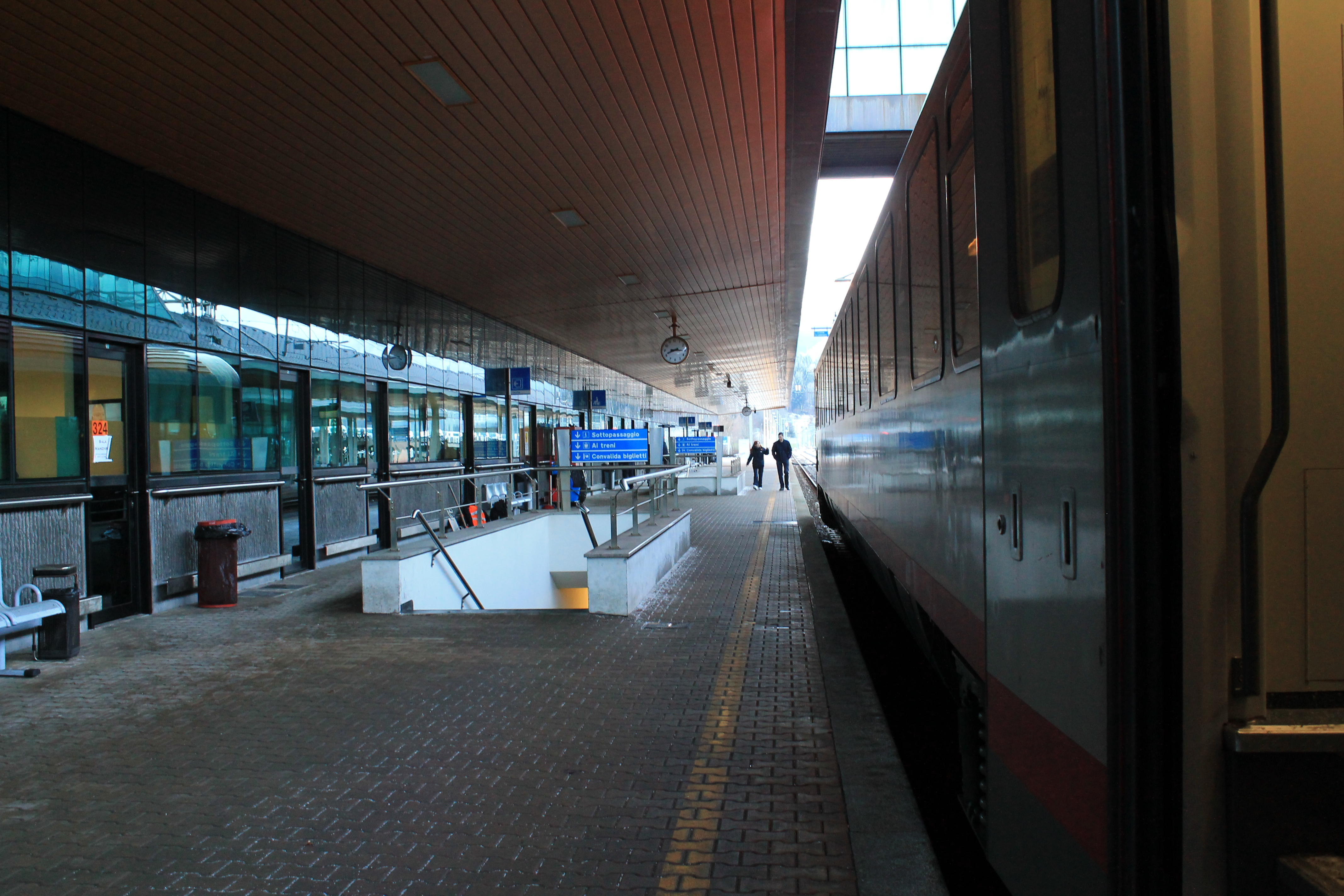 Treno MICOTRA in sosta a Tarvisio Boscoverde